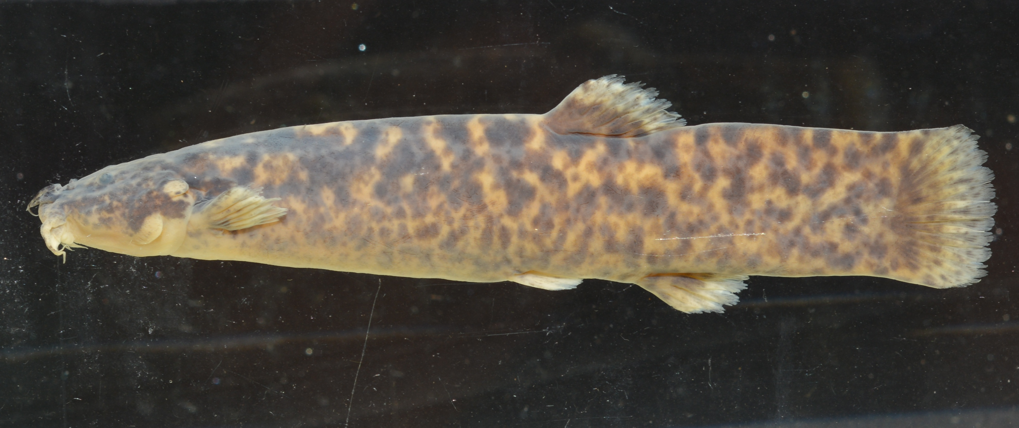 Trichomycterus ytororo